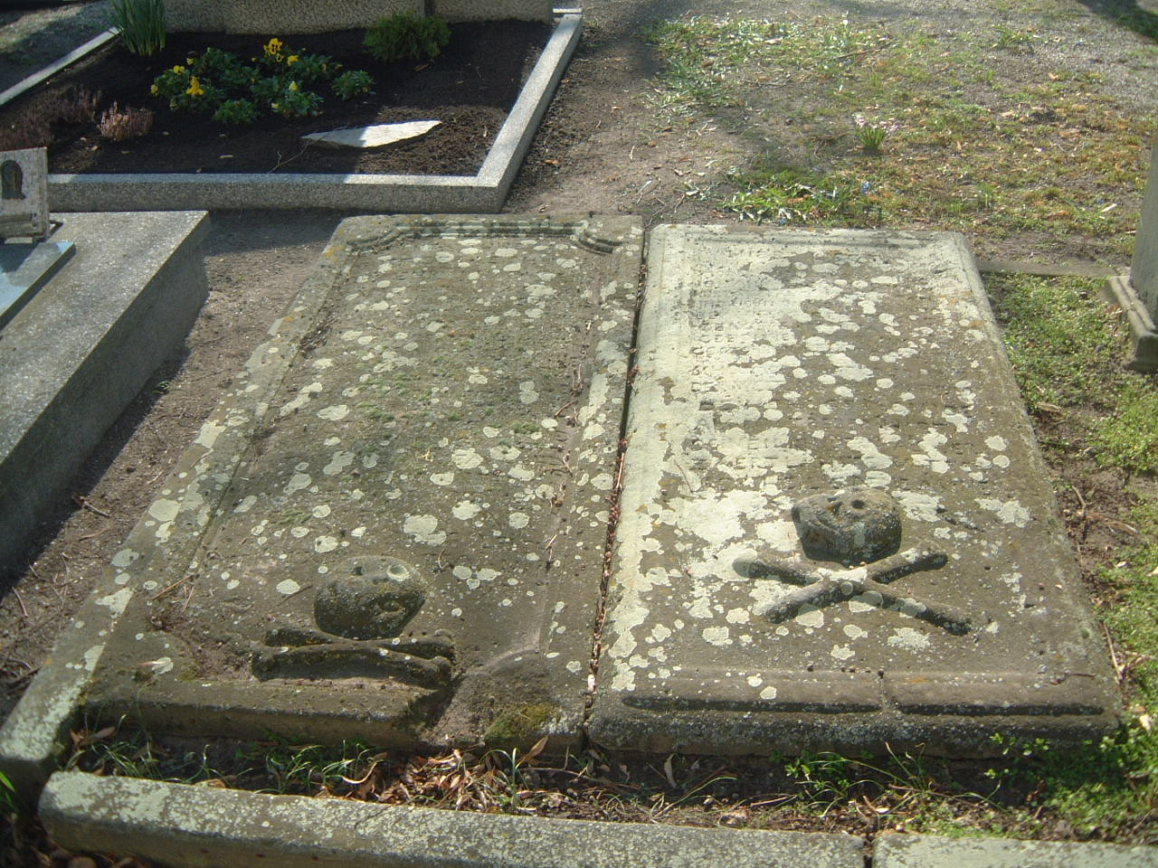 Grabplatten der Eltern von General Justus von Siebein, Bayern